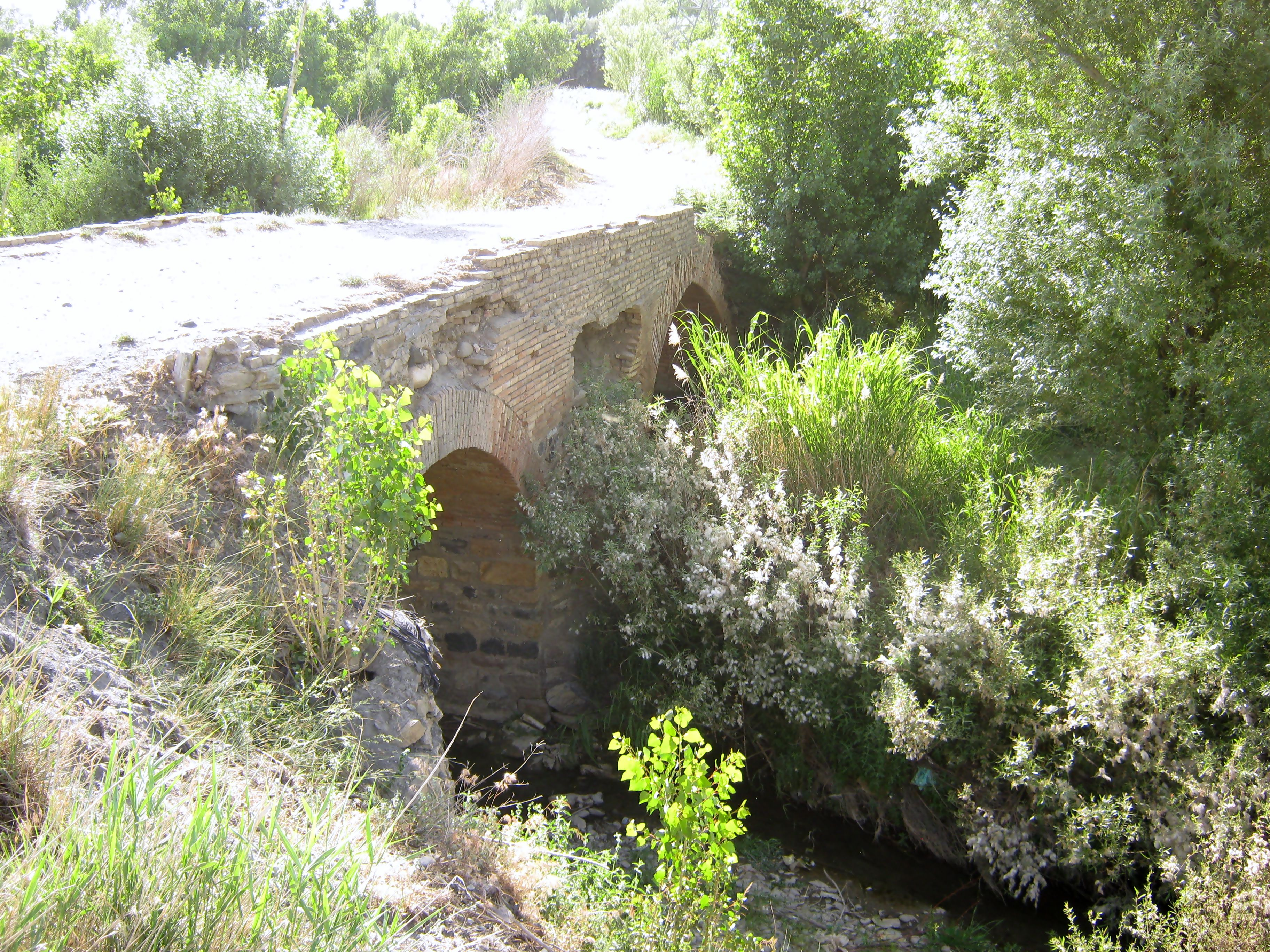 محوطه پل آرامند